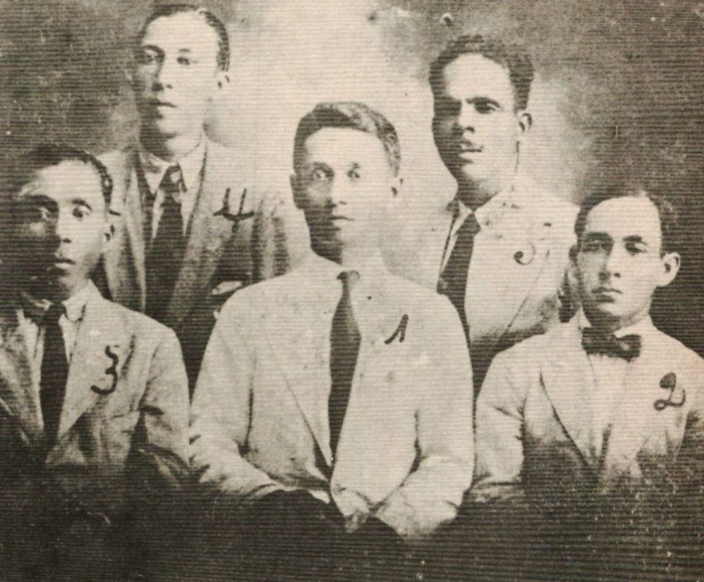 Líderes de la huelga durante la Masacre de las Bananeras. De izquierda a derecha: Pedro M. del Río, Bernardino Guerrero, Raúl Eduardo Mahecha, Nicanor Serrano y Erasmo Coronel.